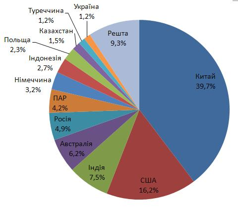 Список країн за виробництвом вугілля